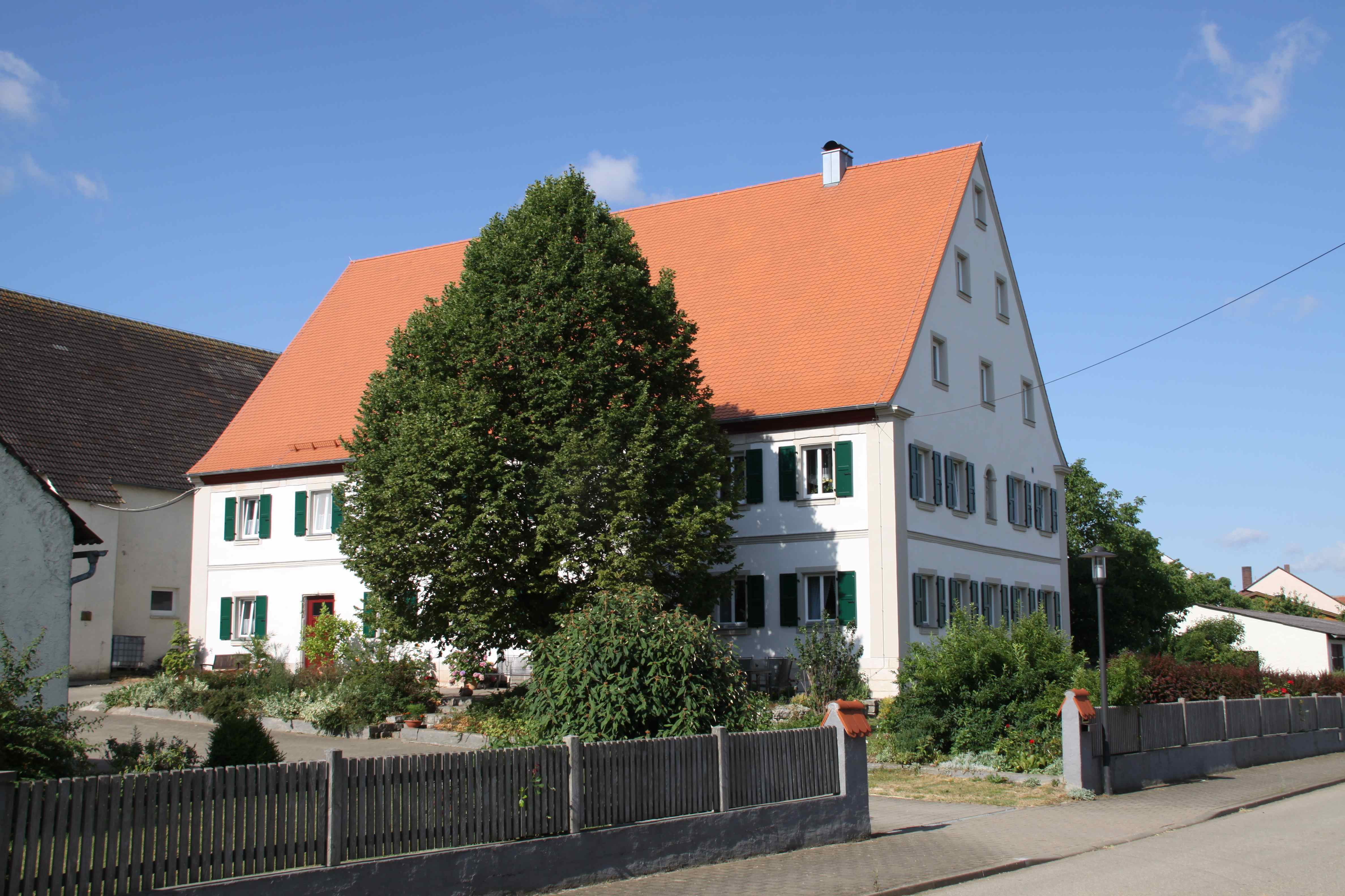 Haus Tiefenbach Nr. 7